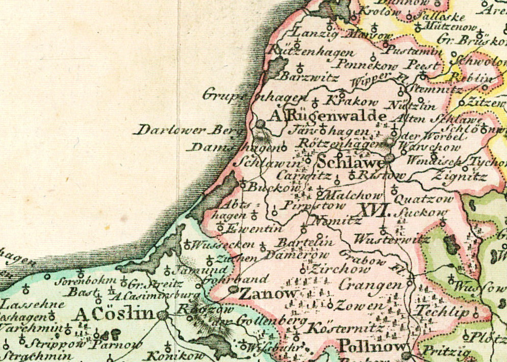 Ausschnitt aus einer Landkarte von Pommern aus dem Jahr 1794 mit den Städten Köslin, Rügenwalde und Schlawe